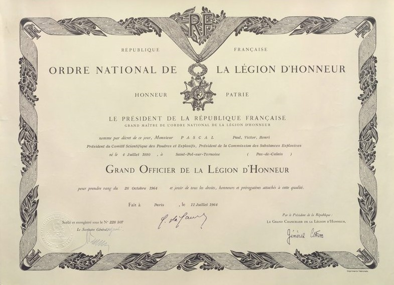 Acte officiel d'attribution de médaille d'honneur à Paul Victor Henri Pascal, grand officier de la légion d'honneur